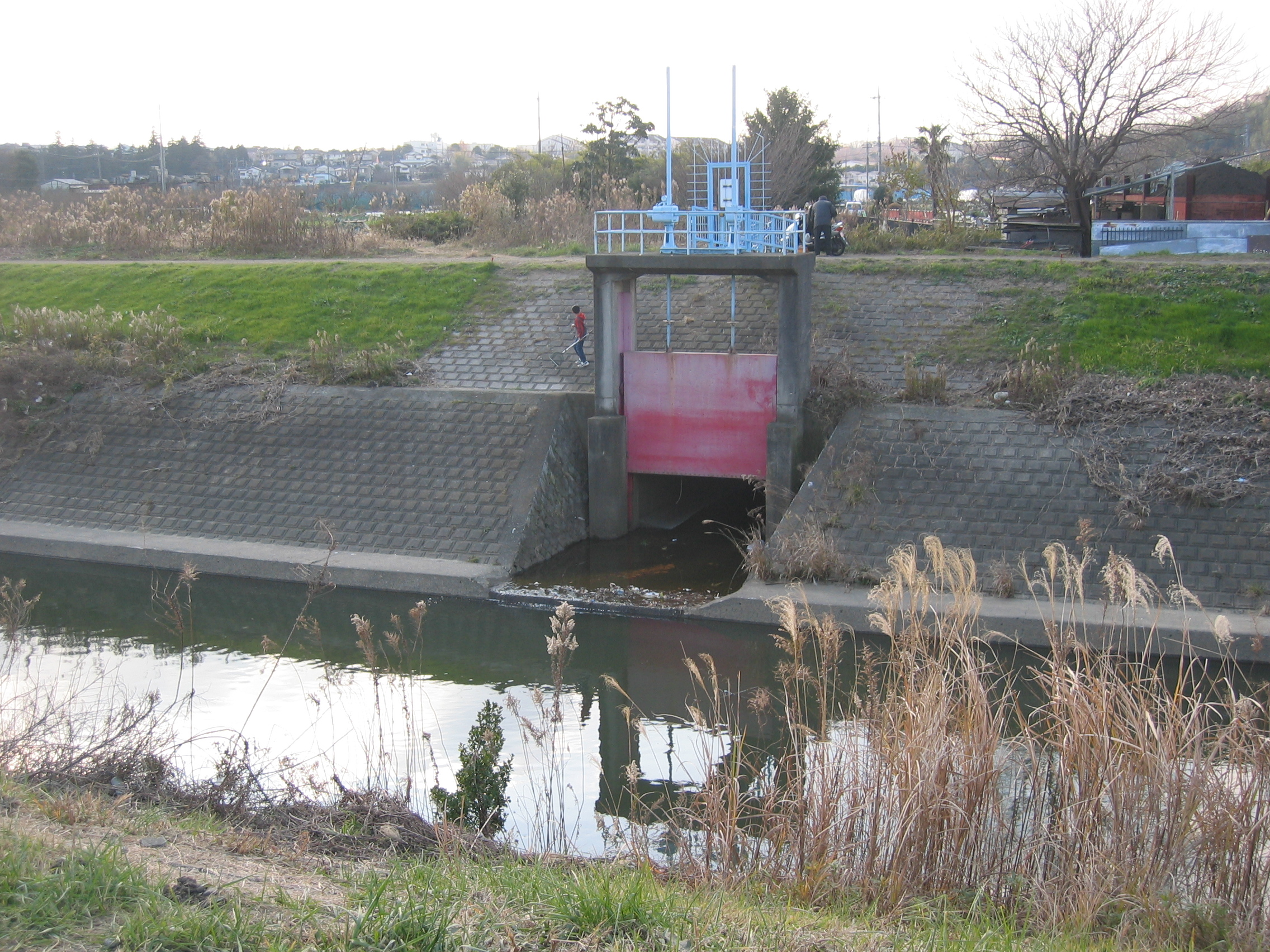 2004年12月28日、利用者自身の撮影。